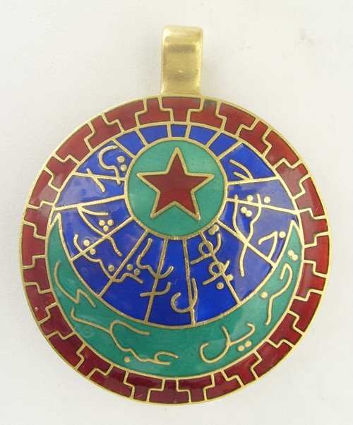 1923 год, серебро, эмаль